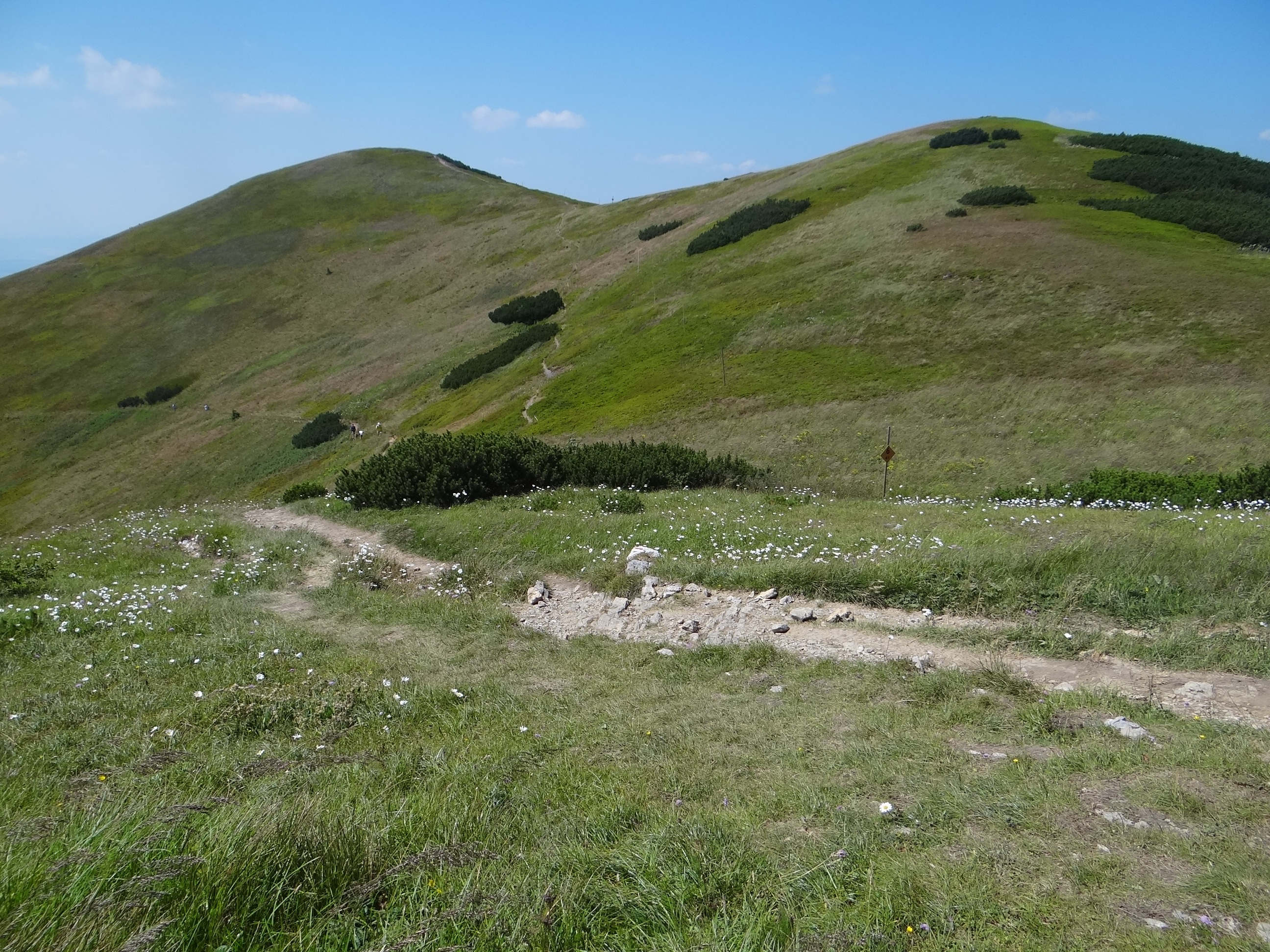 Koniarky